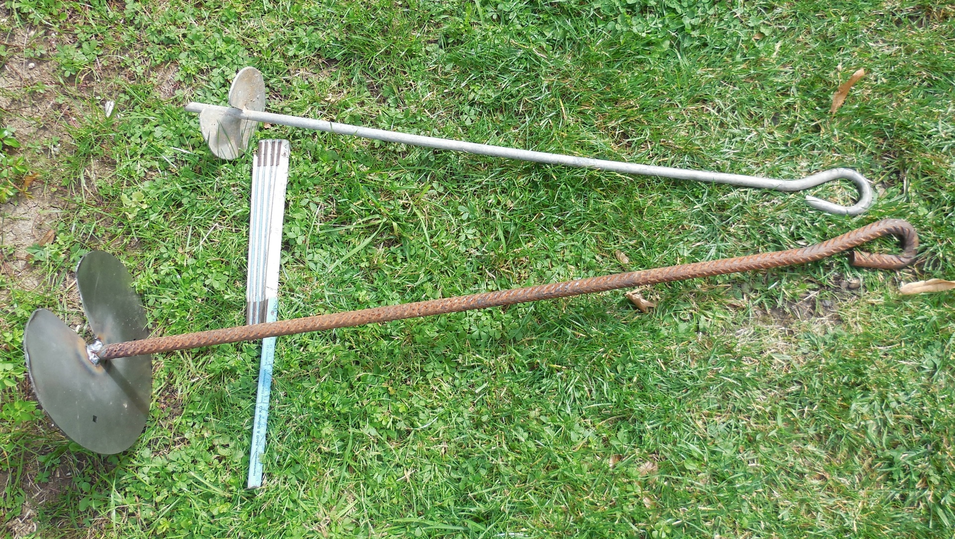 Erdanker zum Schrauben a) 80cm x 12mm mit 12cm Scheibe b) 100cm x 16mm mit 22cm Scheibe